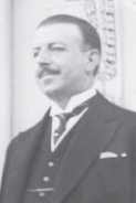 O presidente eleito do Brasil Júlio Prestes.